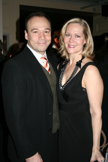 Danny Burstein and Rebecca Luker at NYS ARTS Fall Gala 2008